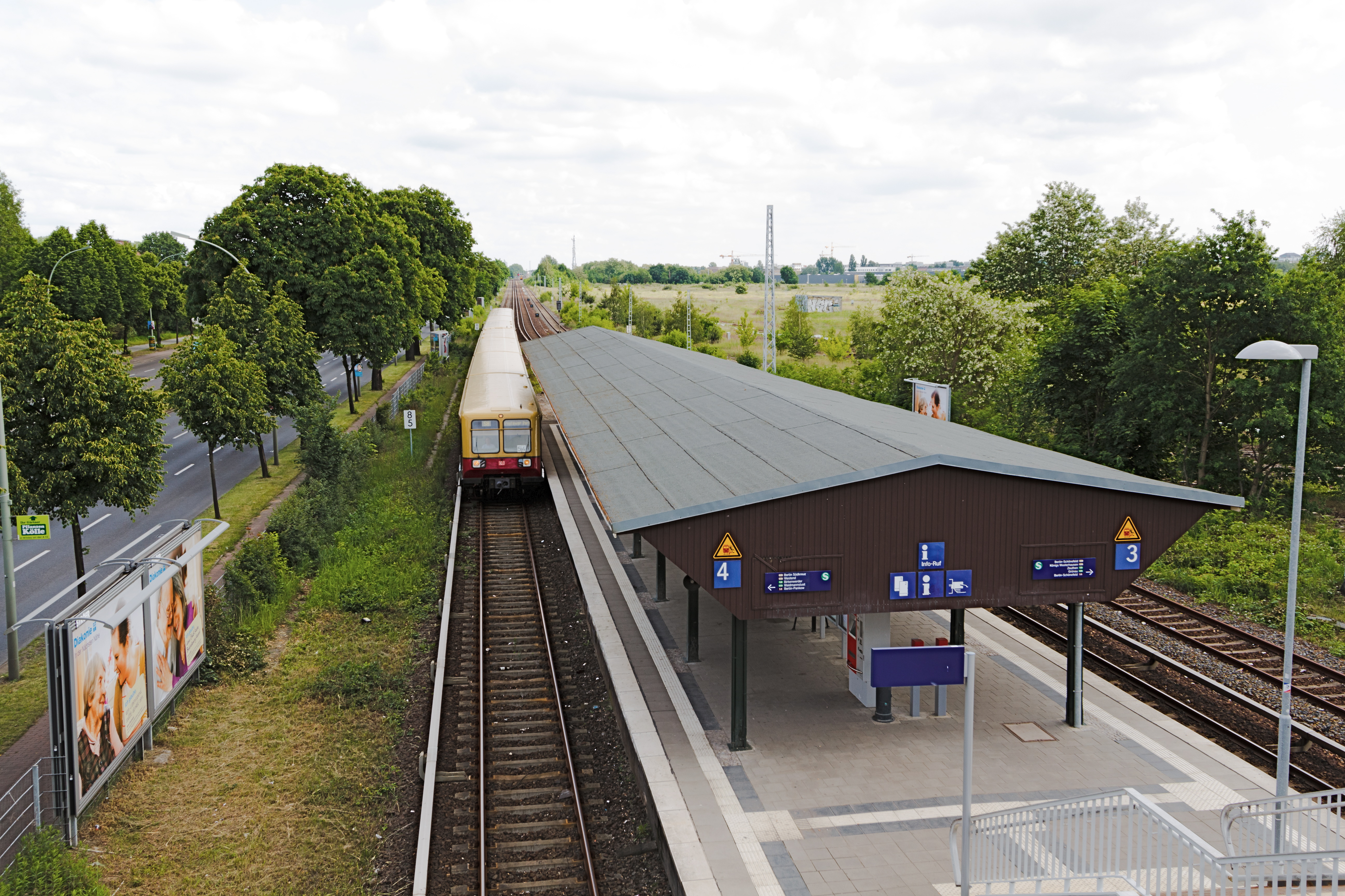 S-Bahnhof Betriebsbahnhof Schöneweide